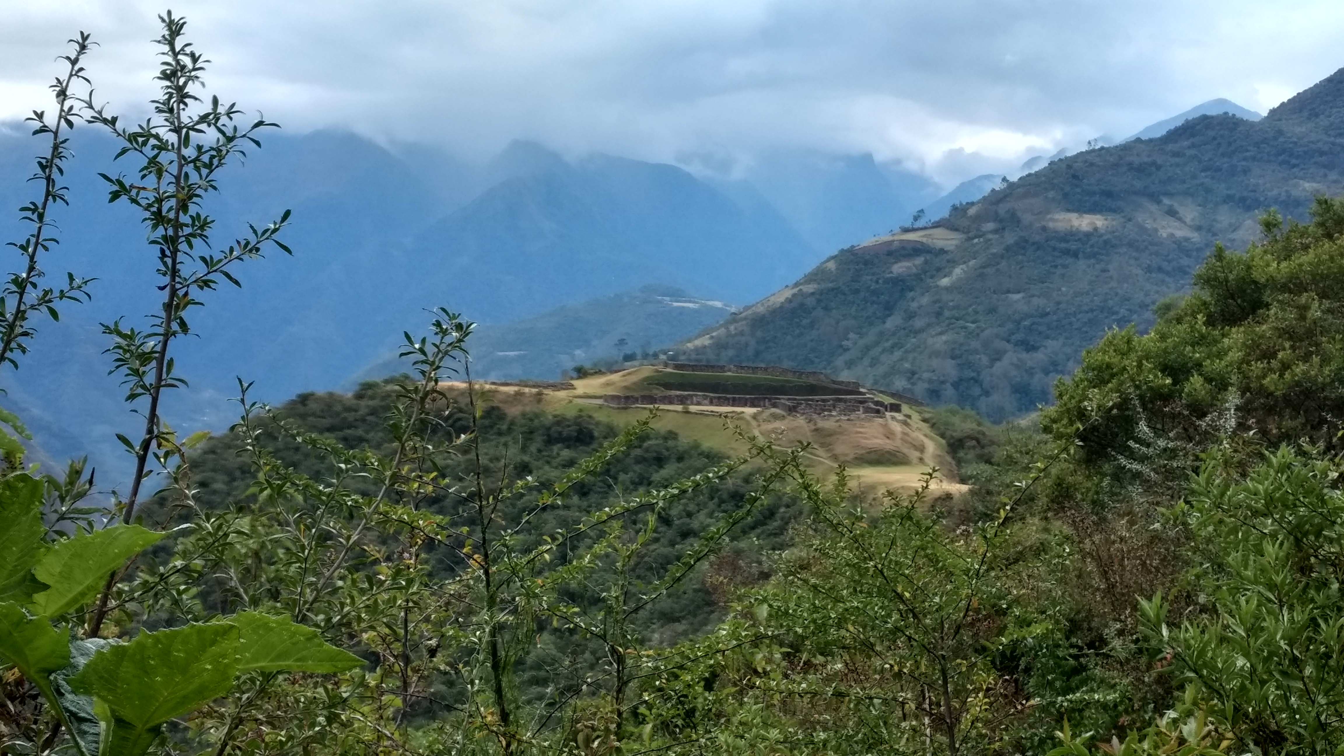 Centro poblado de Pucyura (Vilcabamba - La Convención, región Cusco)